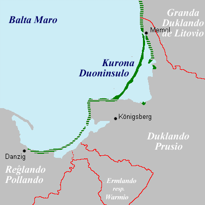 Regionoj kun parolantoj de la (nova) kurona lingvo dum la jaro 1649 (verde) Fonto: anglalingva grafikaĵo en la vikipedia komunejo